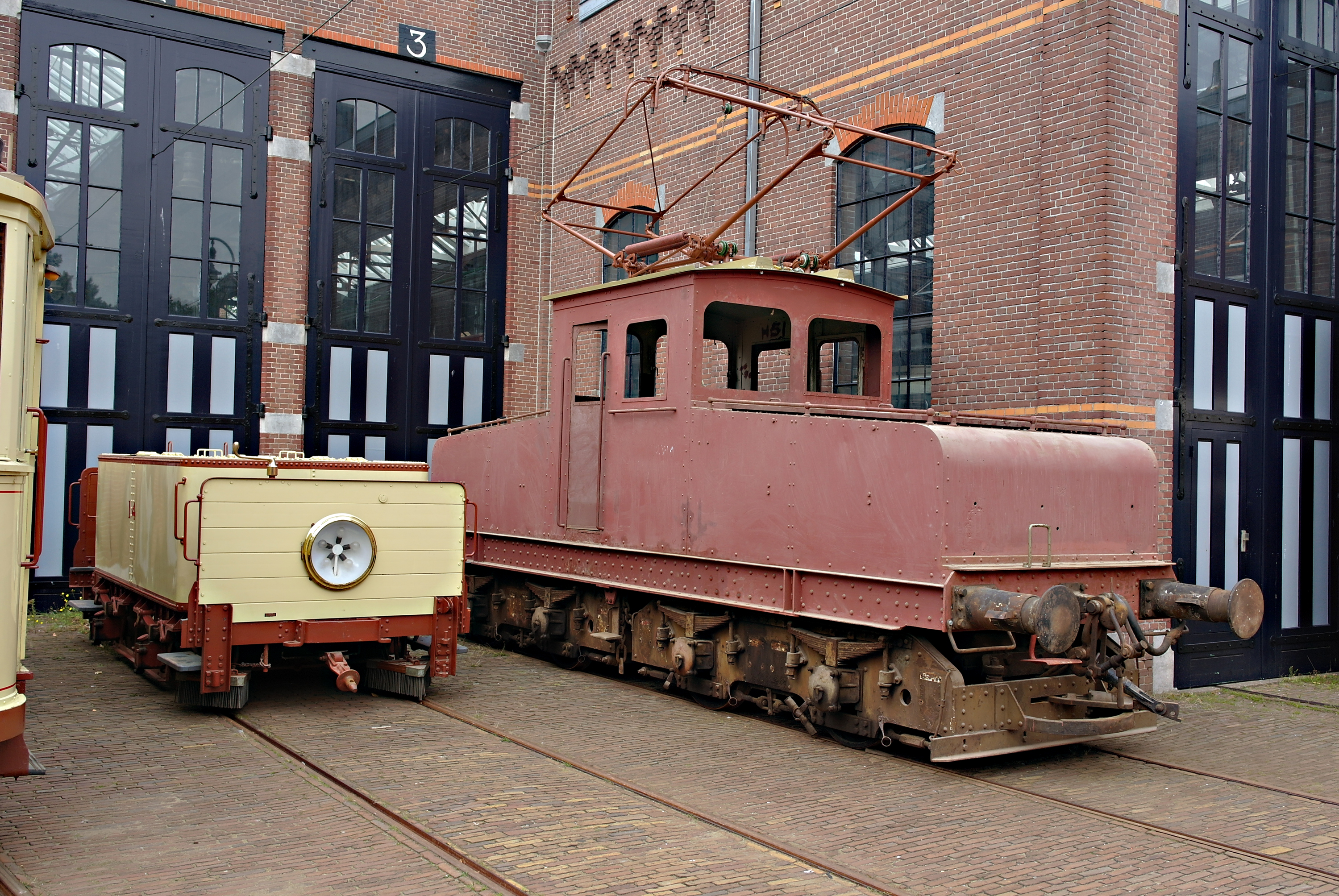 H14 (links)